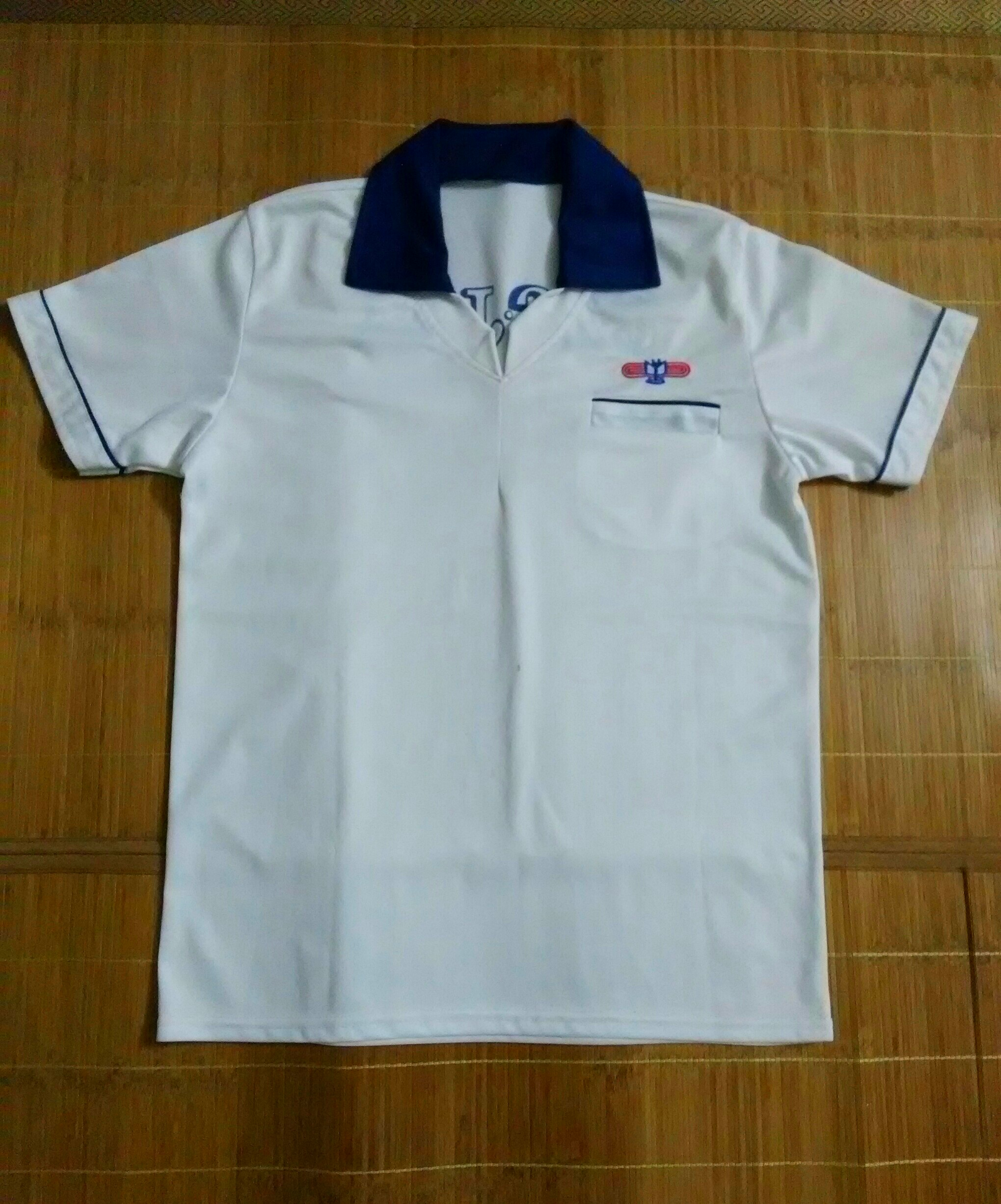 一件中国广东省潮州市城基中学的夏季上衣校服，于2011年制造。